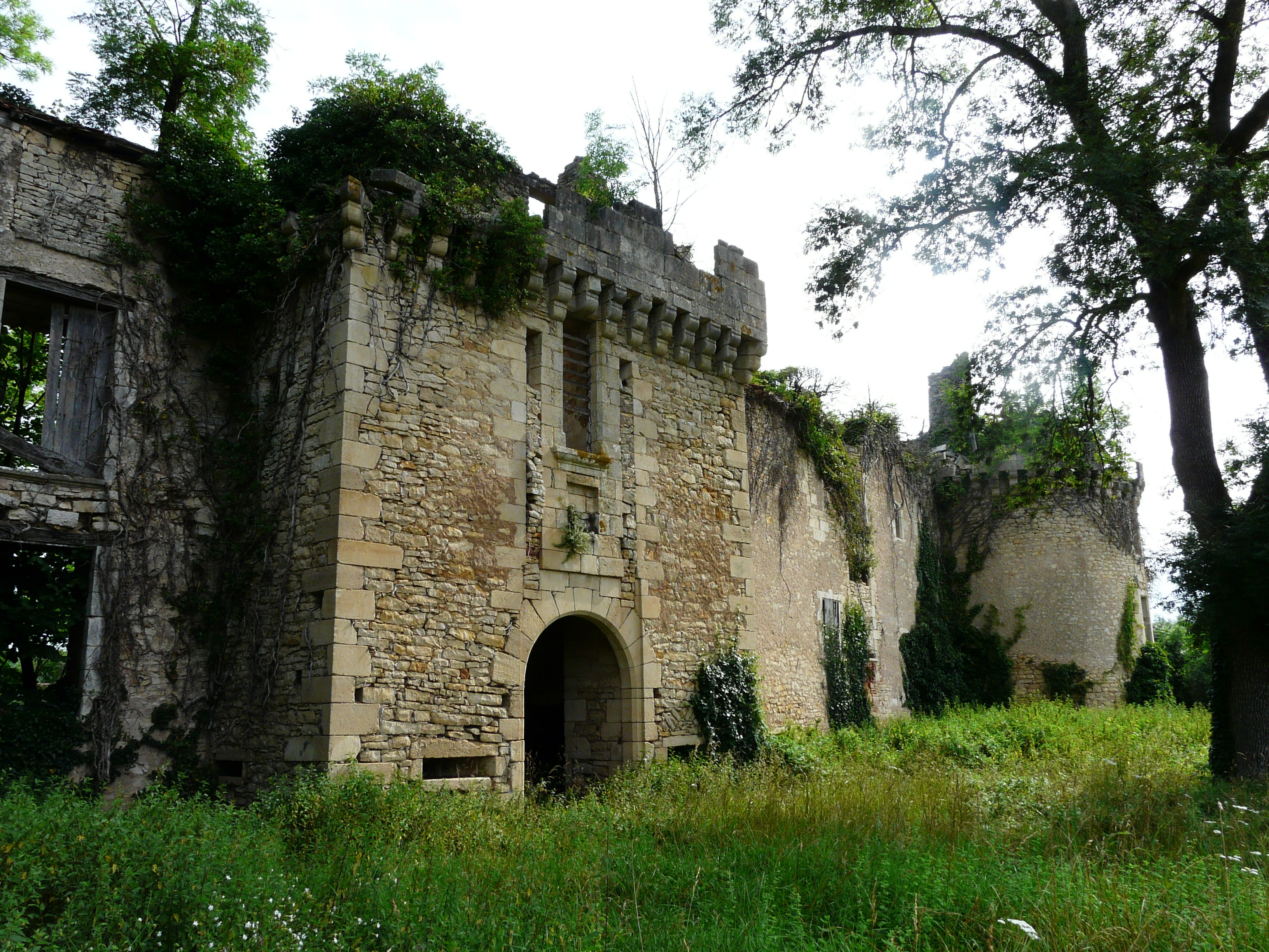 Les ruines du château de Marqueyssac, Saint-Pantaly-d'Ans, Dordogne, France.